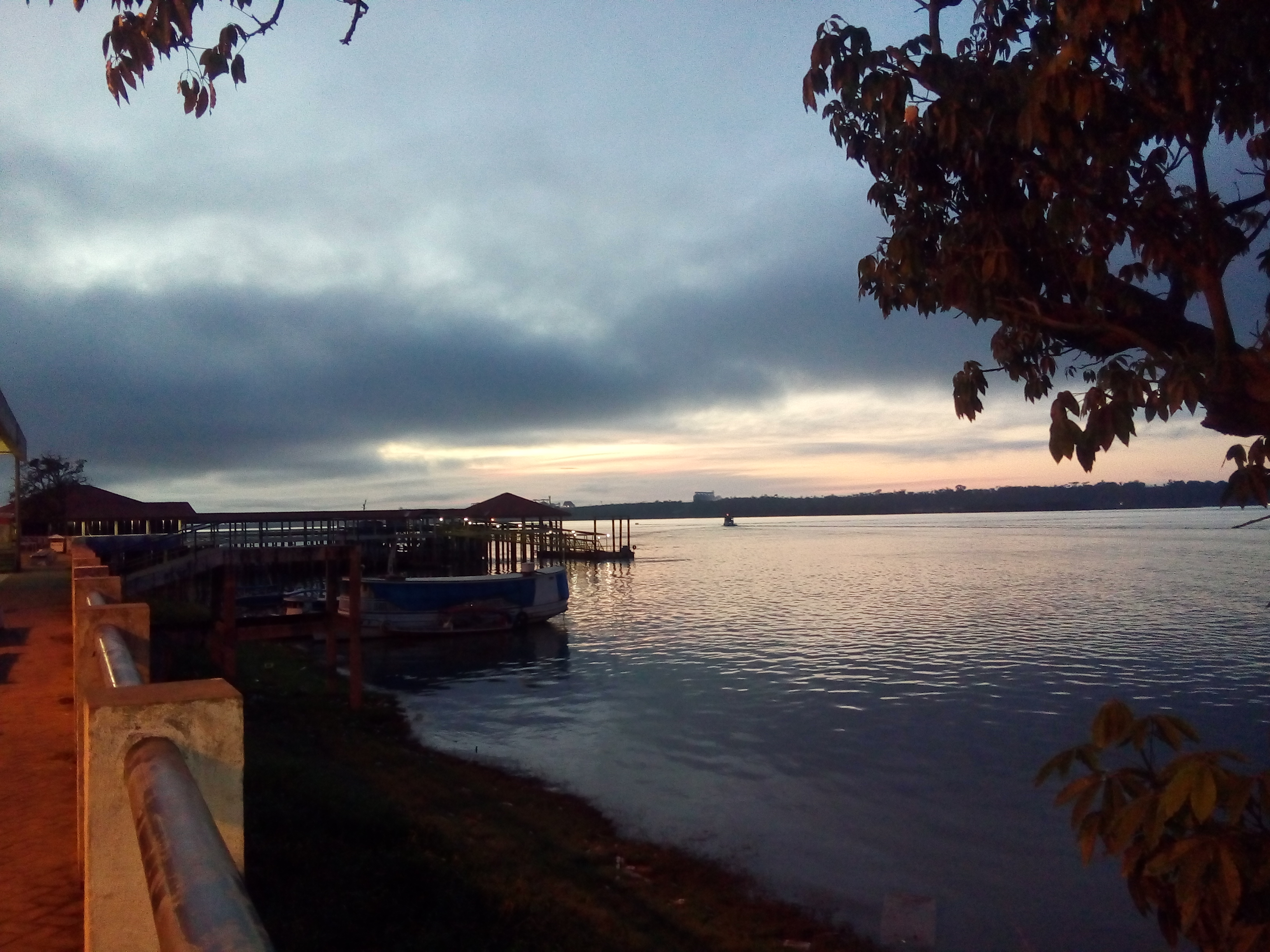 Fotos tiradas do Rio Tapajós que passa dentro do Porque Nacional da Amazônia